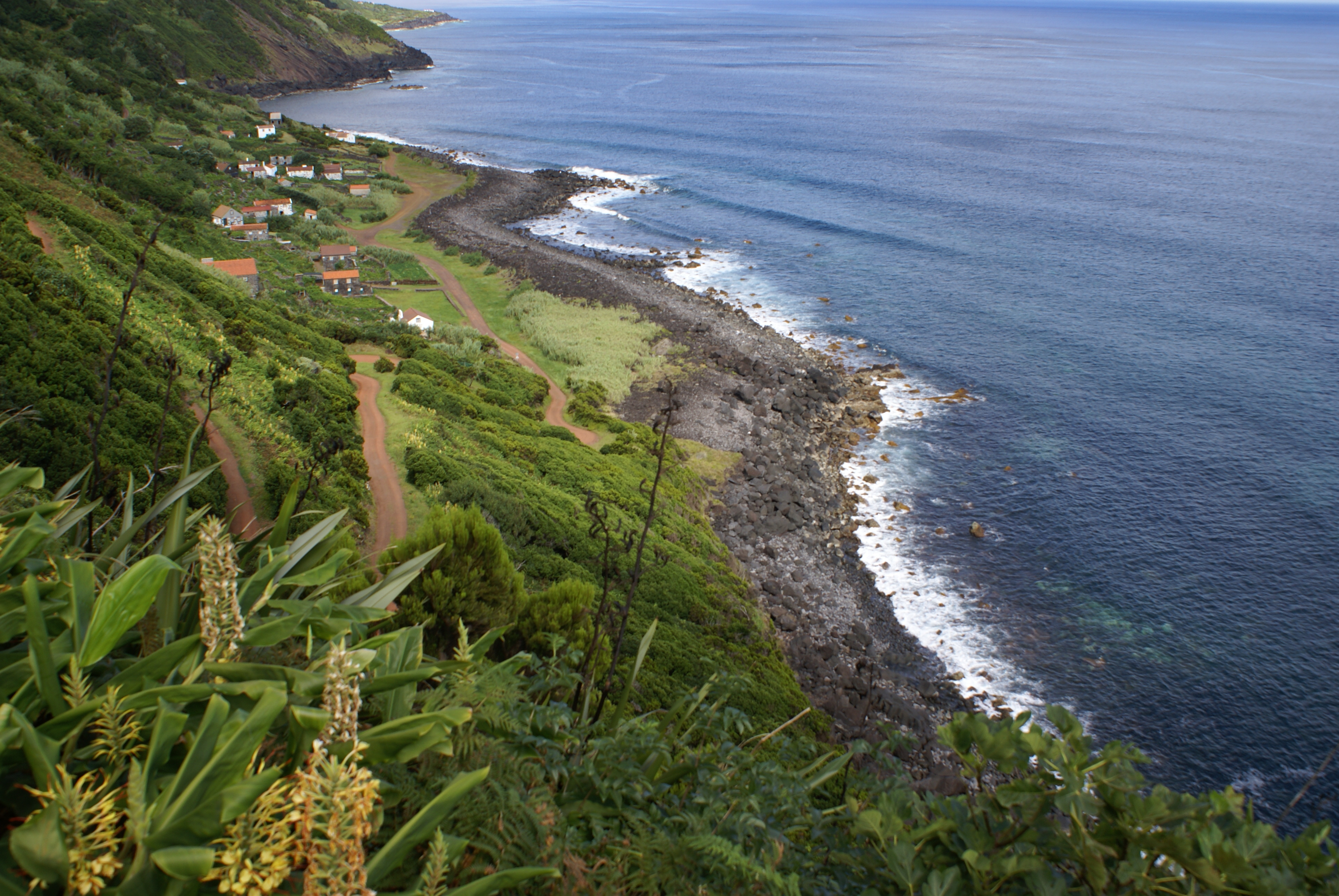 Fajã da Penedia, Norte Pqueno, Calheta, ilha de São Jorge, Açores